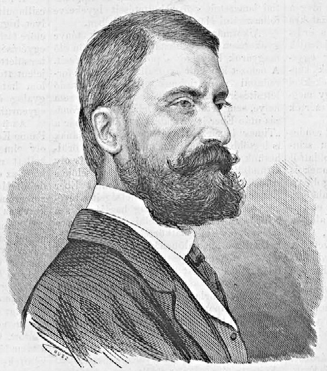 Éber Nándor (1825–1885) országgyűlési képviselő, hírlapíró. Rusz Károly metszete.